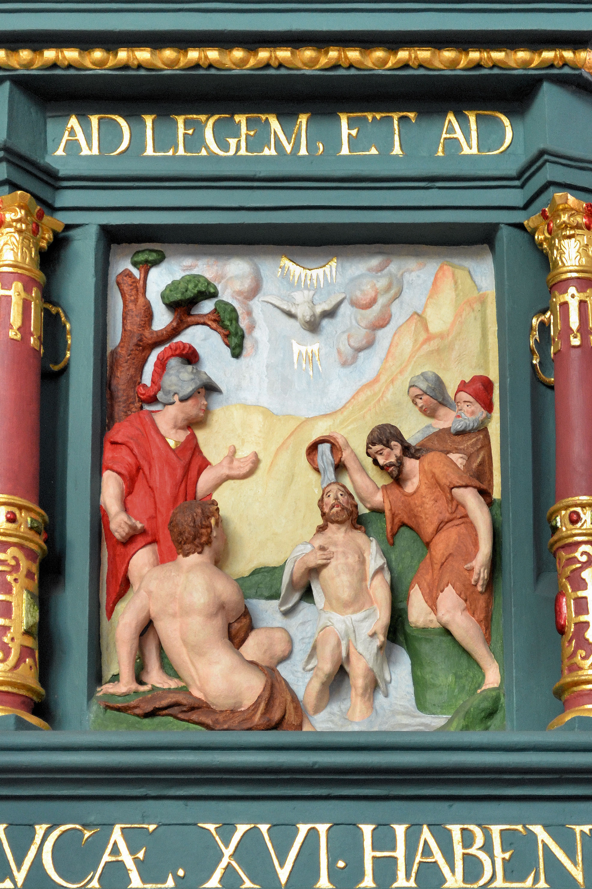 Kościół Narodzenia Najświętszej Maryi Panny w Gryfinie